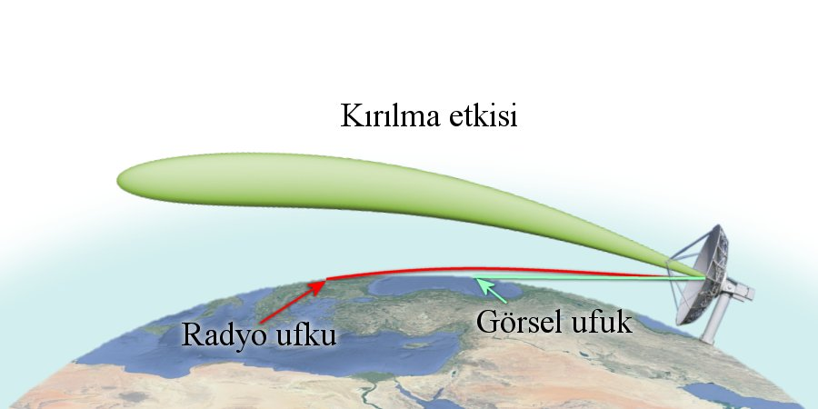 Der Radarhorizont ist etwas weiter entfernt als der optische Horizont. Das ist eine Folge der Refraktion elektromagnetischer Wellen in der Atmosphäre.